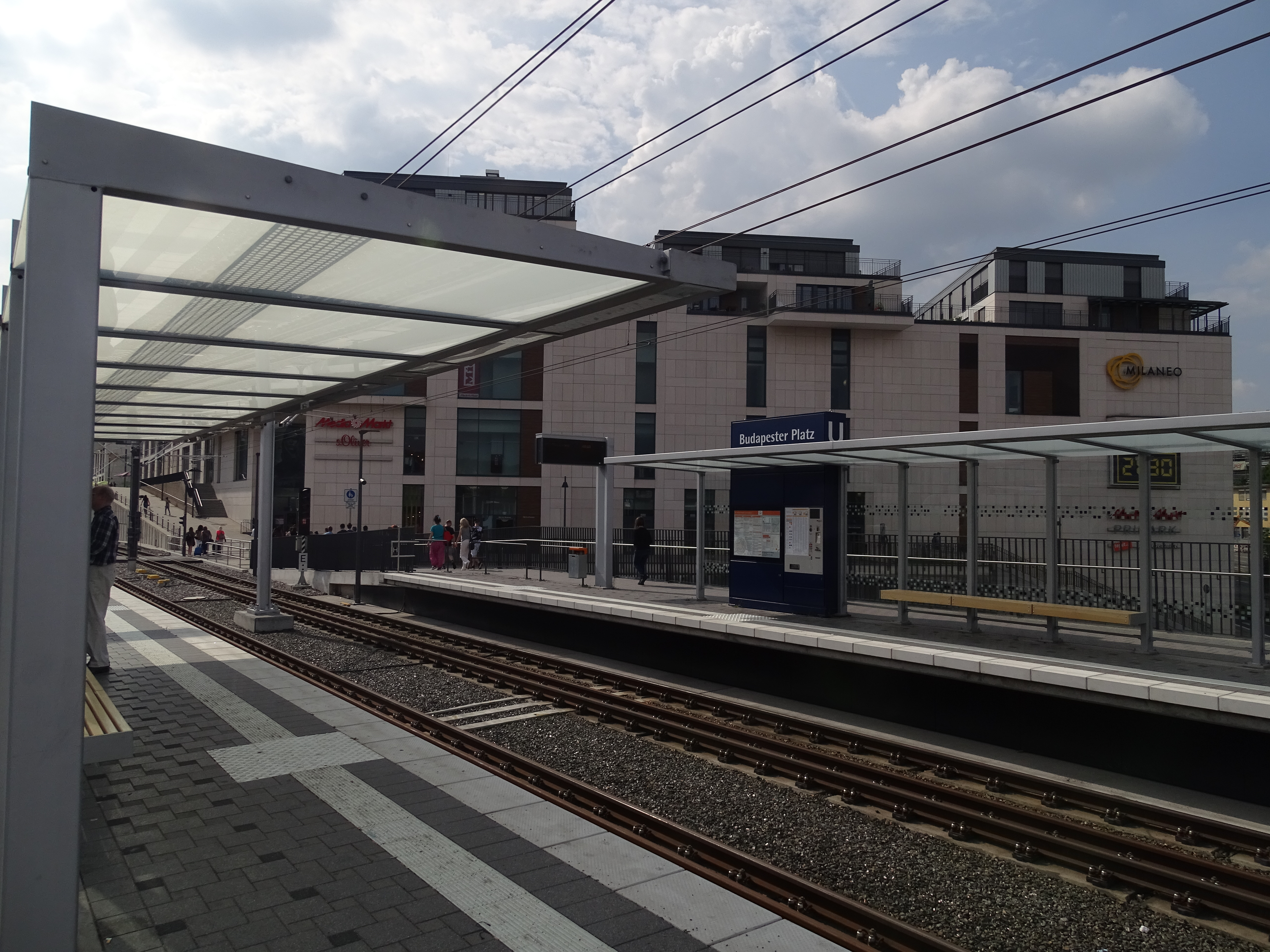 Stadtbahnstation Budapester Platz